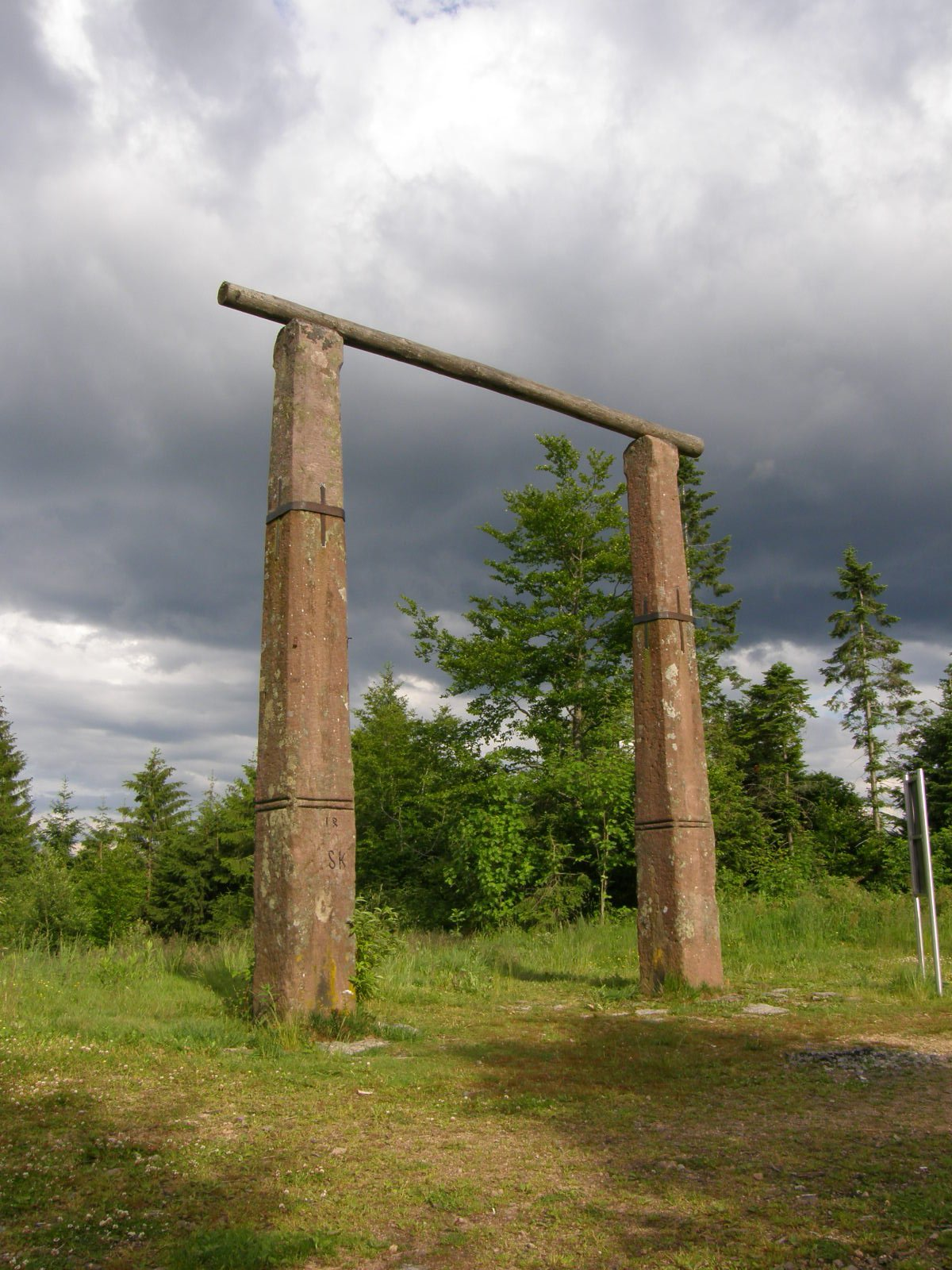 Hochgericht Stöcklewald, Schwarzwald-Baar-Kreis